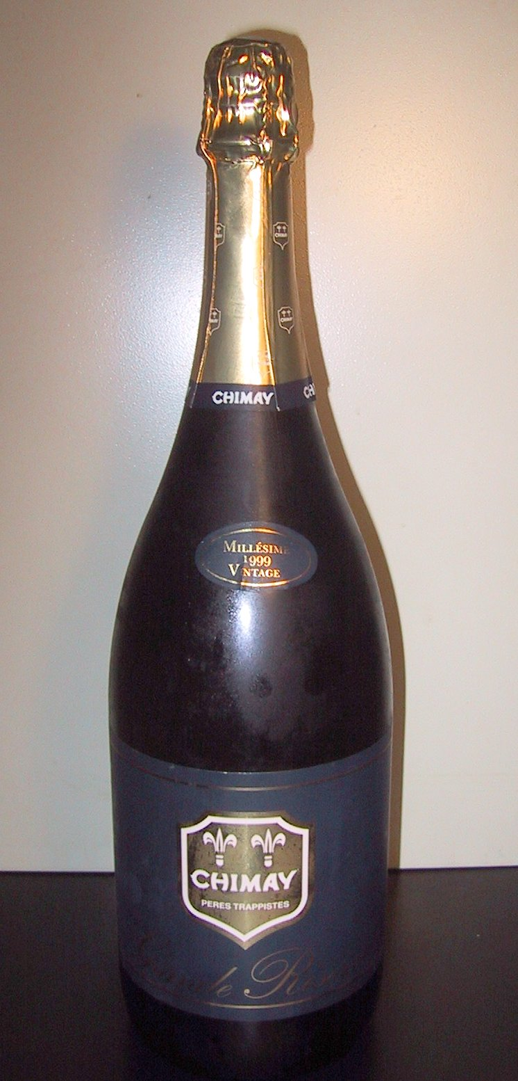 Magnum of Chimay bleue grande réserve, millésime 1999 Vintage, trappist beer (Belgium).